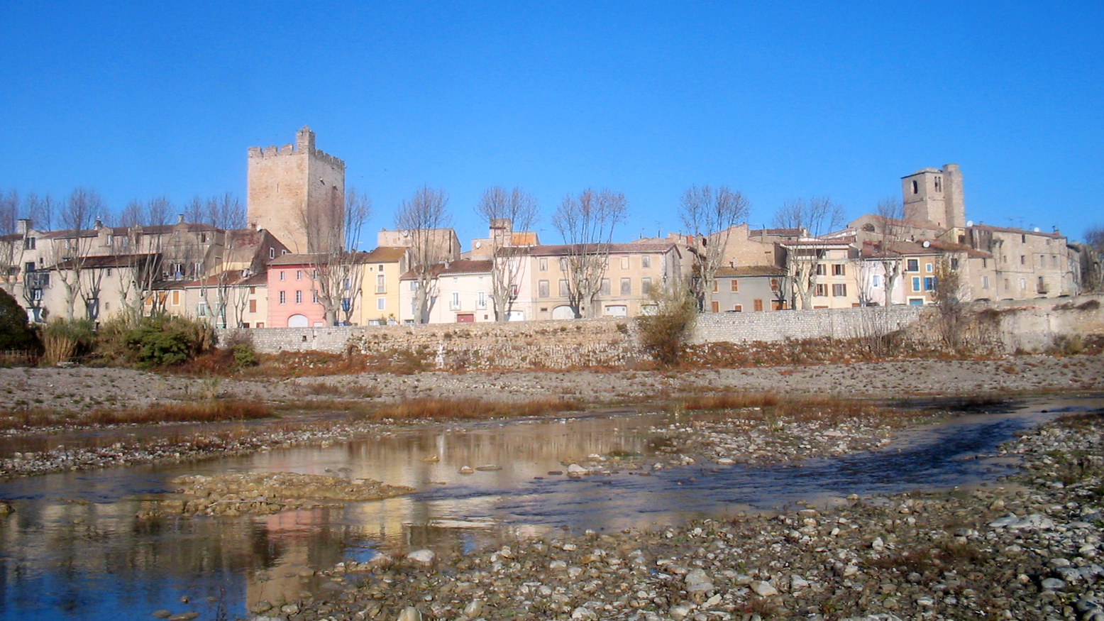 Fabrezan : vue depuis la rive de l'Orbieu